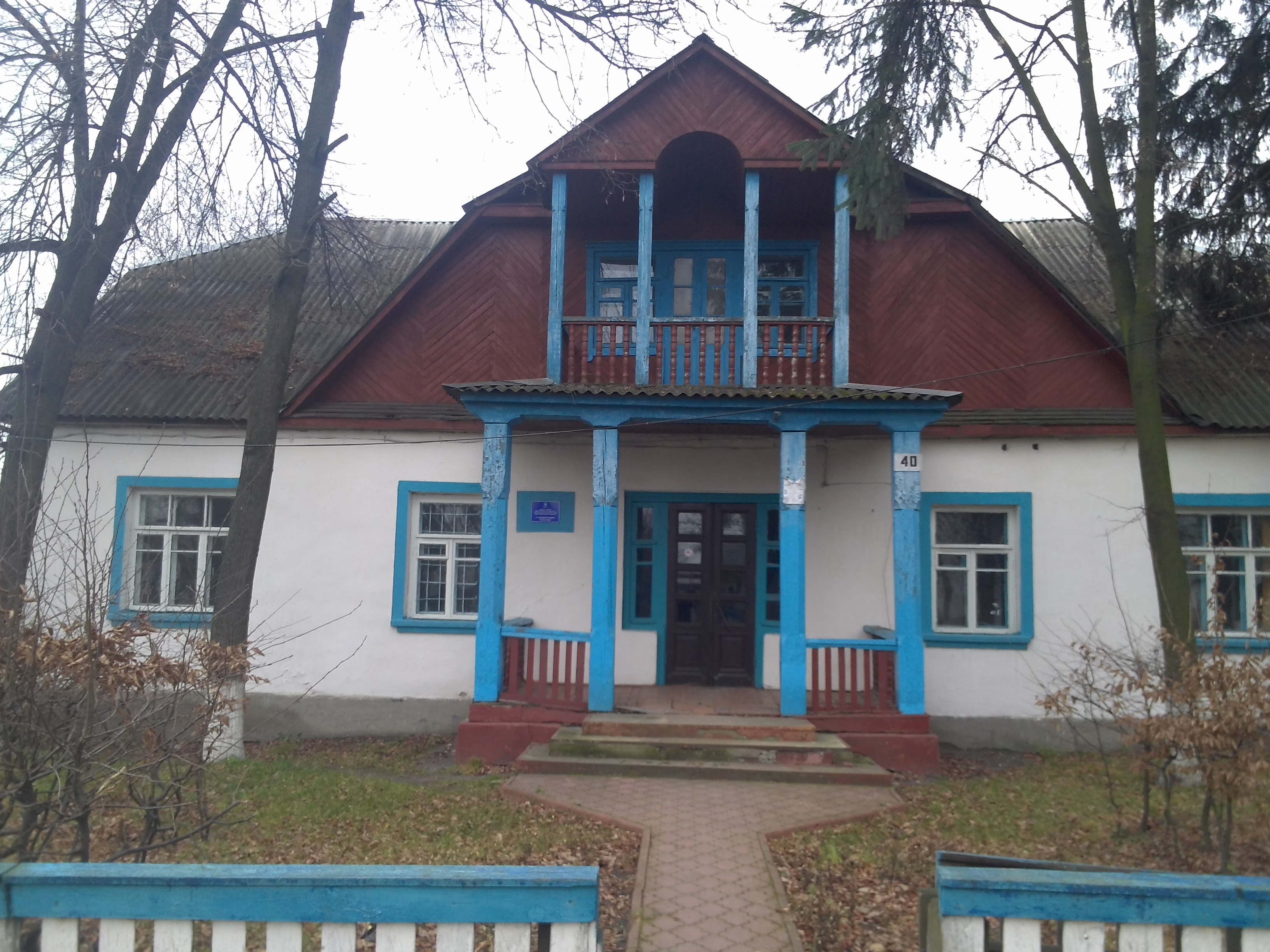 м. Малин. Станція юних техніків